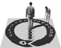 Reloj de Sol Analemático RPLl2006